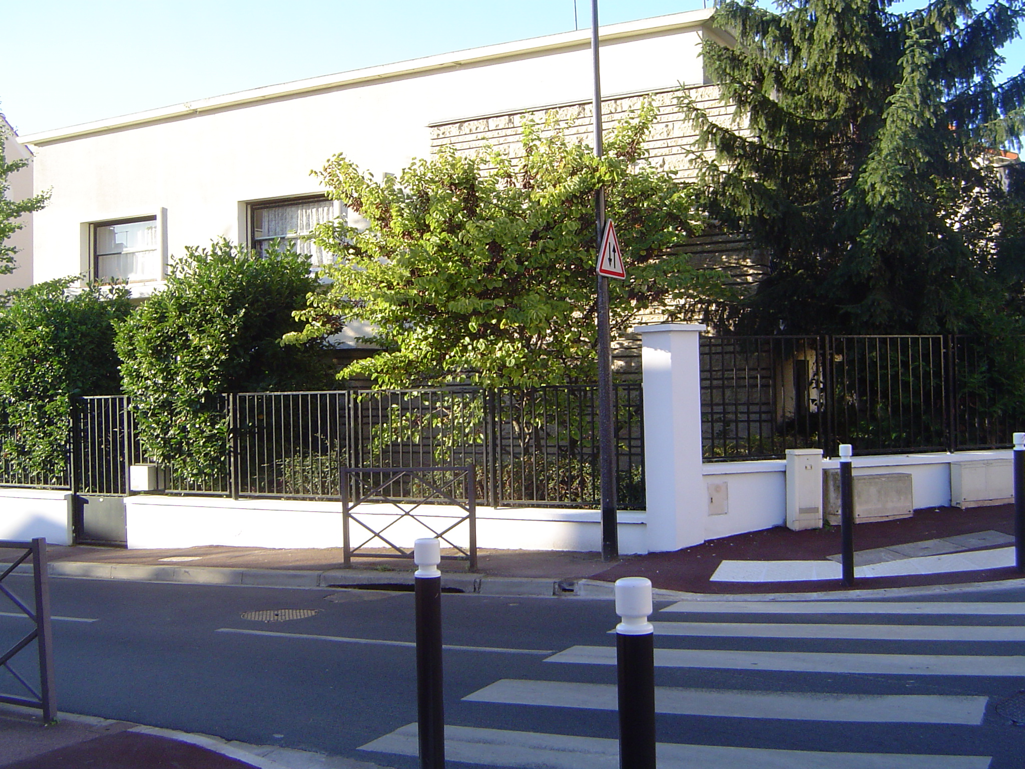 Photo prise à Antony (France)